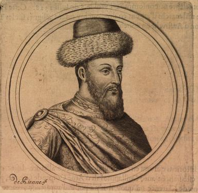 Edward of Savoy